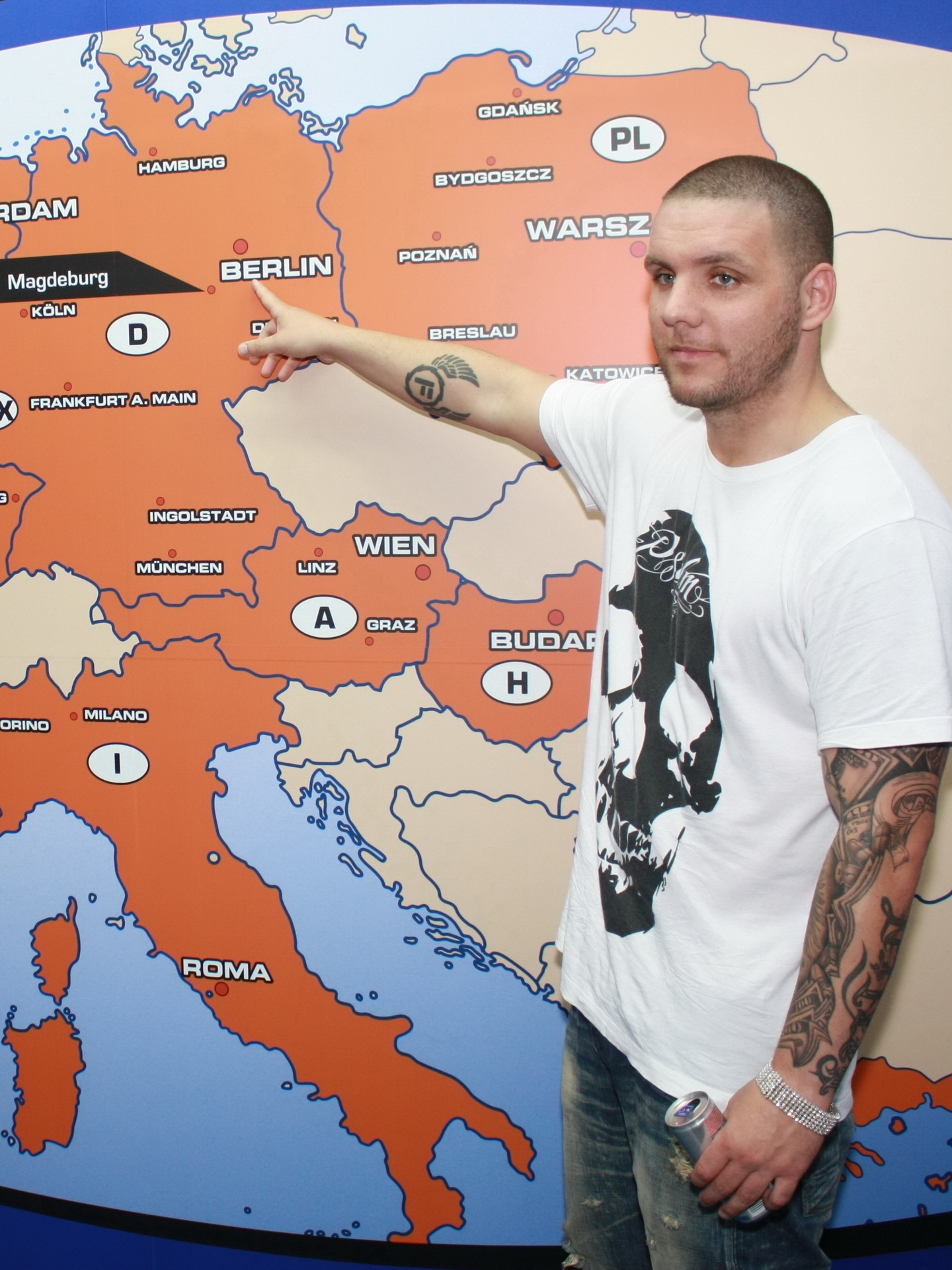 Fler bei Autogrammstunde im Saturn Magdeburg am 20.09.2011